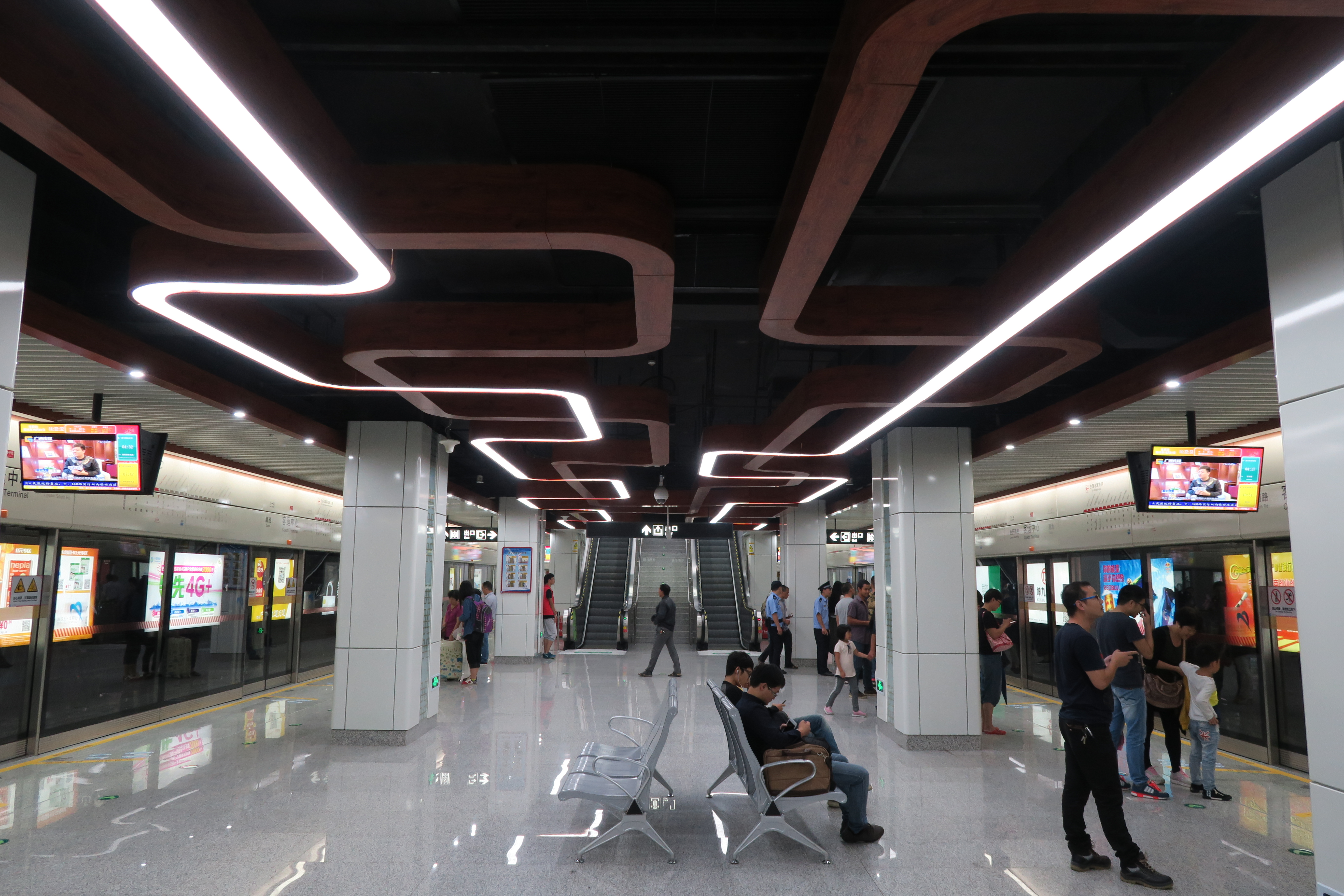 宁波轨道交通2号线客运中心站